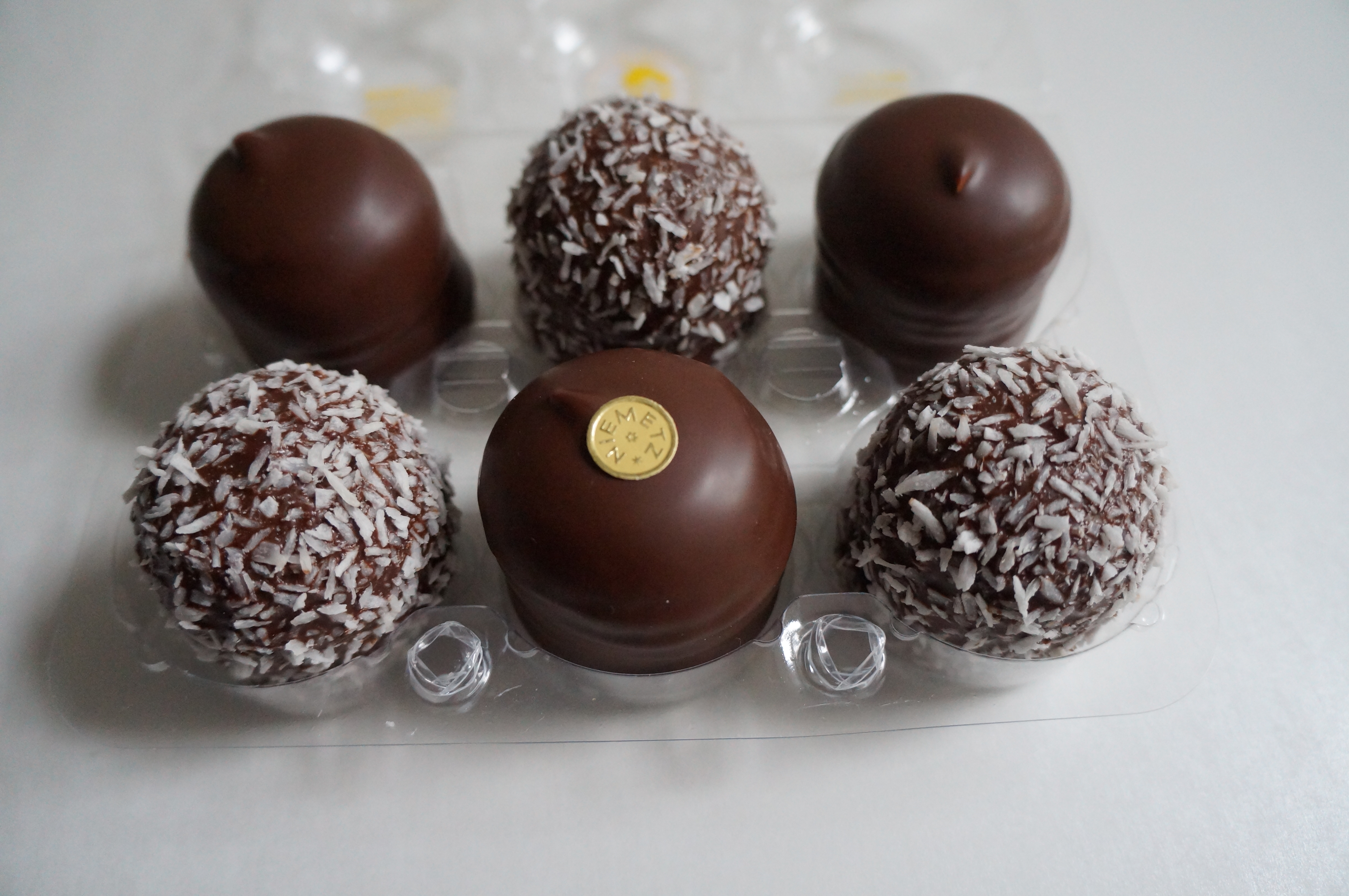 Schwedenbombe mit einer Goldplakette